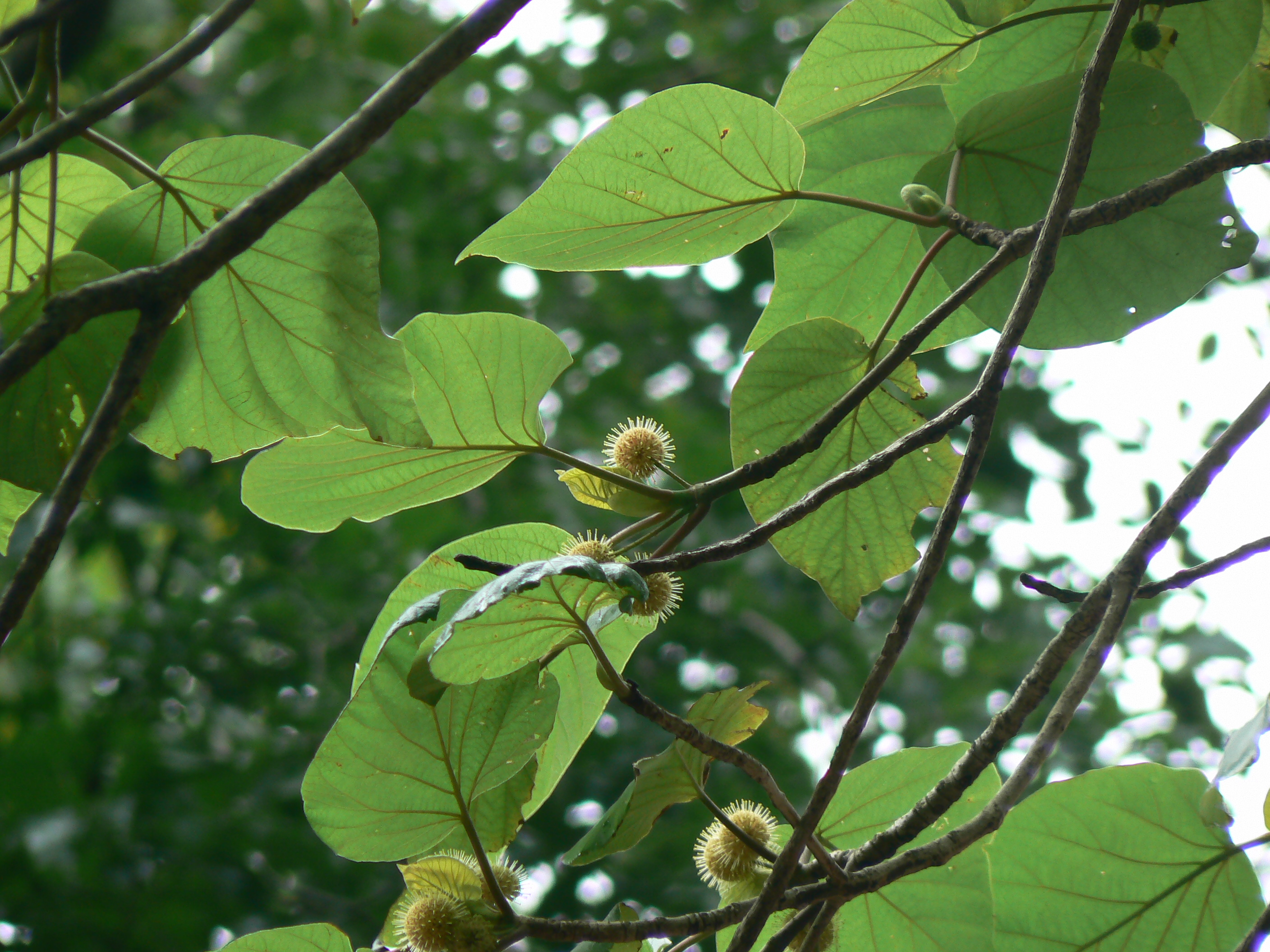 Rubiaceae (madder, bedstraw, or coffee family) » Haldina cordifolia commonly known as: yellow teak, haldu, saffron teak, turmeric wood • Assamese: tarakchapa • Gujarati: હળદરવો haldarvo • Hindi: हलदु haldu, हेदी hedi, कदमी kadami • Kannada: ಅರಿಸಿನ ತೇಗ arisina tega, ಹೆತ್ತೇಗ hettega • Malayalam: മഞ്ഞക്കടമ്പ് manjakkatamp • Marathi: हेद hed, हेदू hedu • Mizo: lungkhup • Nepalese: करम karam, कर्मा karma • Oriya: holondo • Sanskrit: धाराकदम्ब dharakadambah, गिरिकदम्ब girikadambah, haridraka, नीप nipa • Tamil: மஞ்சட்கடம்பு mancatkatampu • Telugu: దాడుగచెట్టు dadugacettu, పసుపుకదంబ pasupukadamba Native to: China, Bangladesh, India, Nepal, Sri Lanka, Indo-China References: Flowers of India • World Agroforestry Centre • NPGS / GRIN